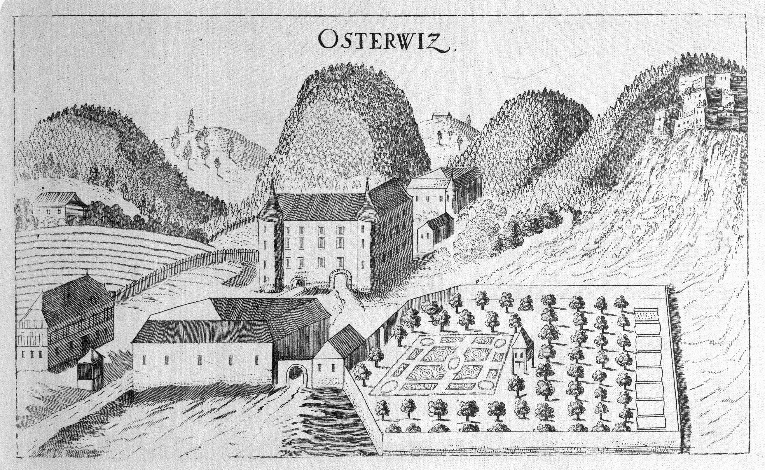 G. M. Vischers Käyserlichen Geographi, Topographia Ducatus Stiriae, Das ist: Eigentliche Delineation / und Abbildung aller Städte / Schlösser / Marcktfleck / Lustgärten / Probsteyen / Stiffter / Clöster und Kirchen / so es sich im Herzogthumb Steyrmarck befinden; Und anjetzo Umb einen billichen Preyß zu finden seynd Bey Johann Bitsch Universitäts Buchhandlern / Auff dem Juden=Platz bey der guldenen Saulen. Graz 1681 Die Nummerierung der Dateien folgt der alphabetischen Reihung der Ortsnamen und entspricht nicht dem Vischer-Register